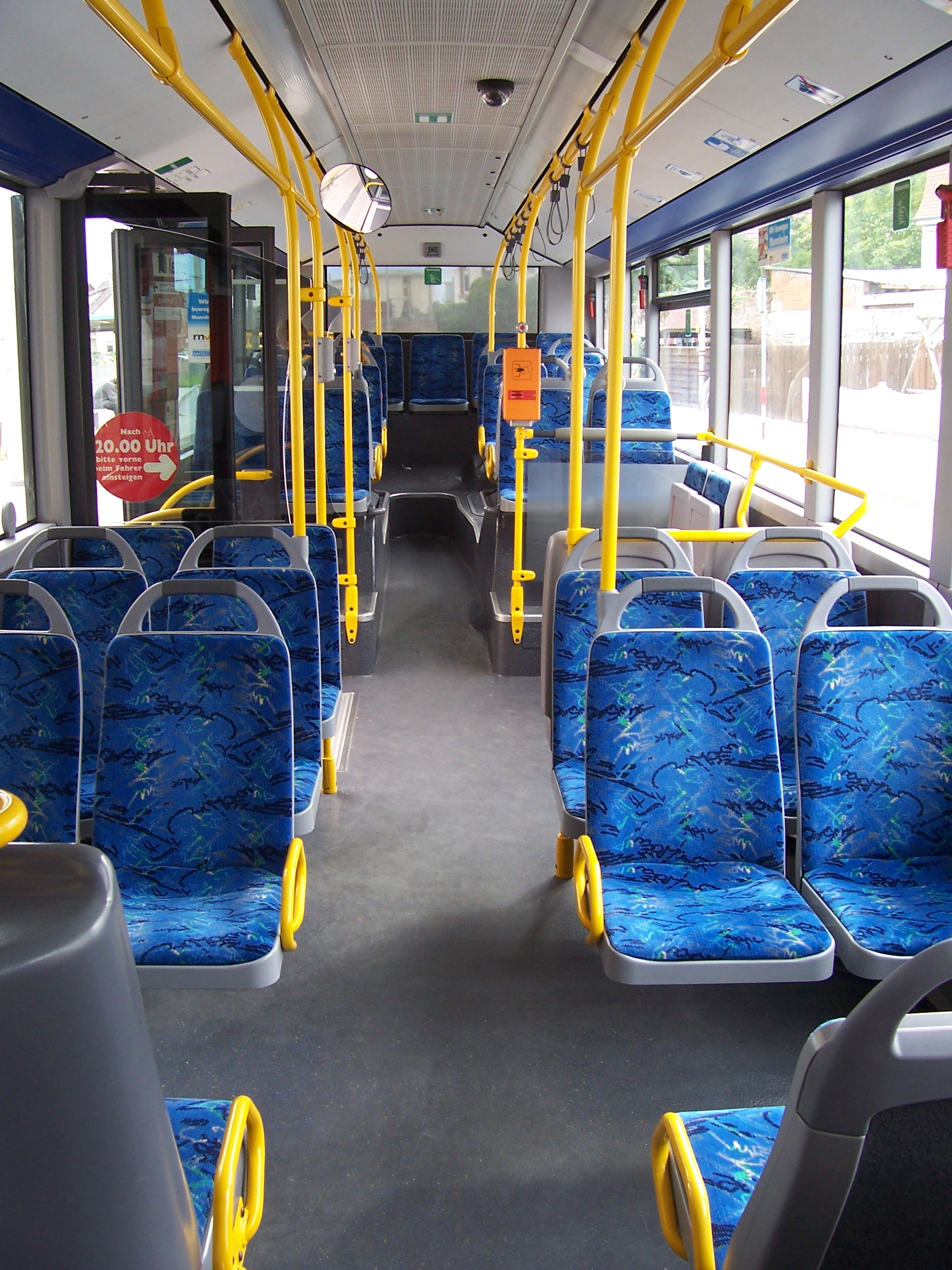 Innenansicht eines Mercedes-Benz Citaro der MVV Verkehr AG in Mannheim.